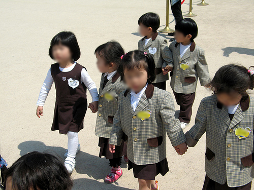 어린이